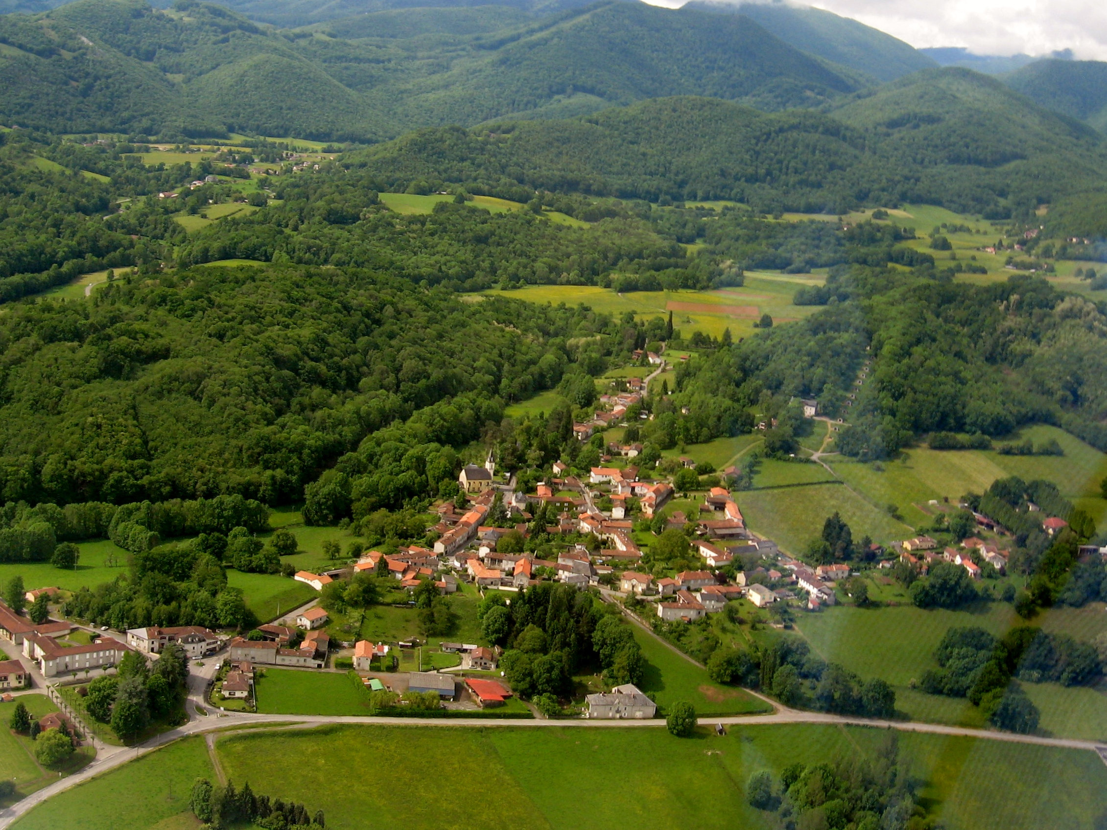 Nestier dans le piémont pyrénéen